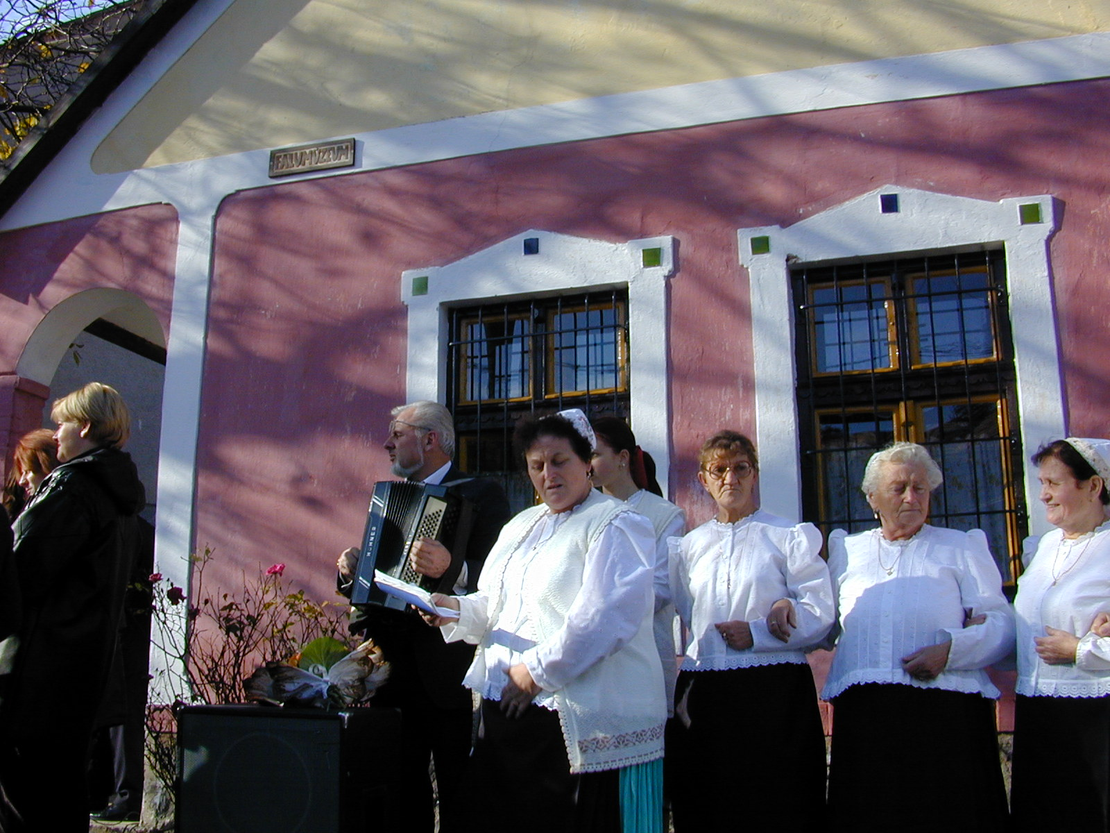 A szlovák tájház avatóünnepsége